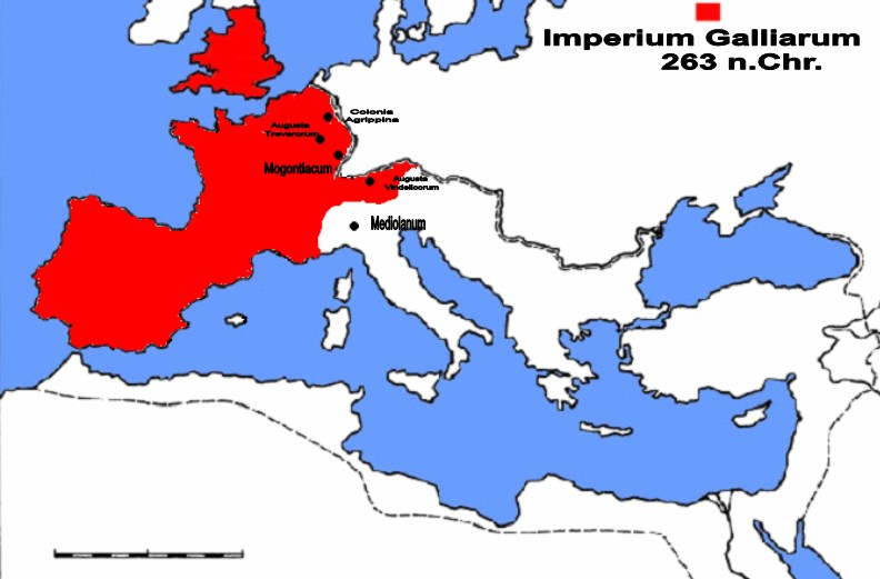 Karte des Sonderreiches des Postumus um 263 n.Chr.